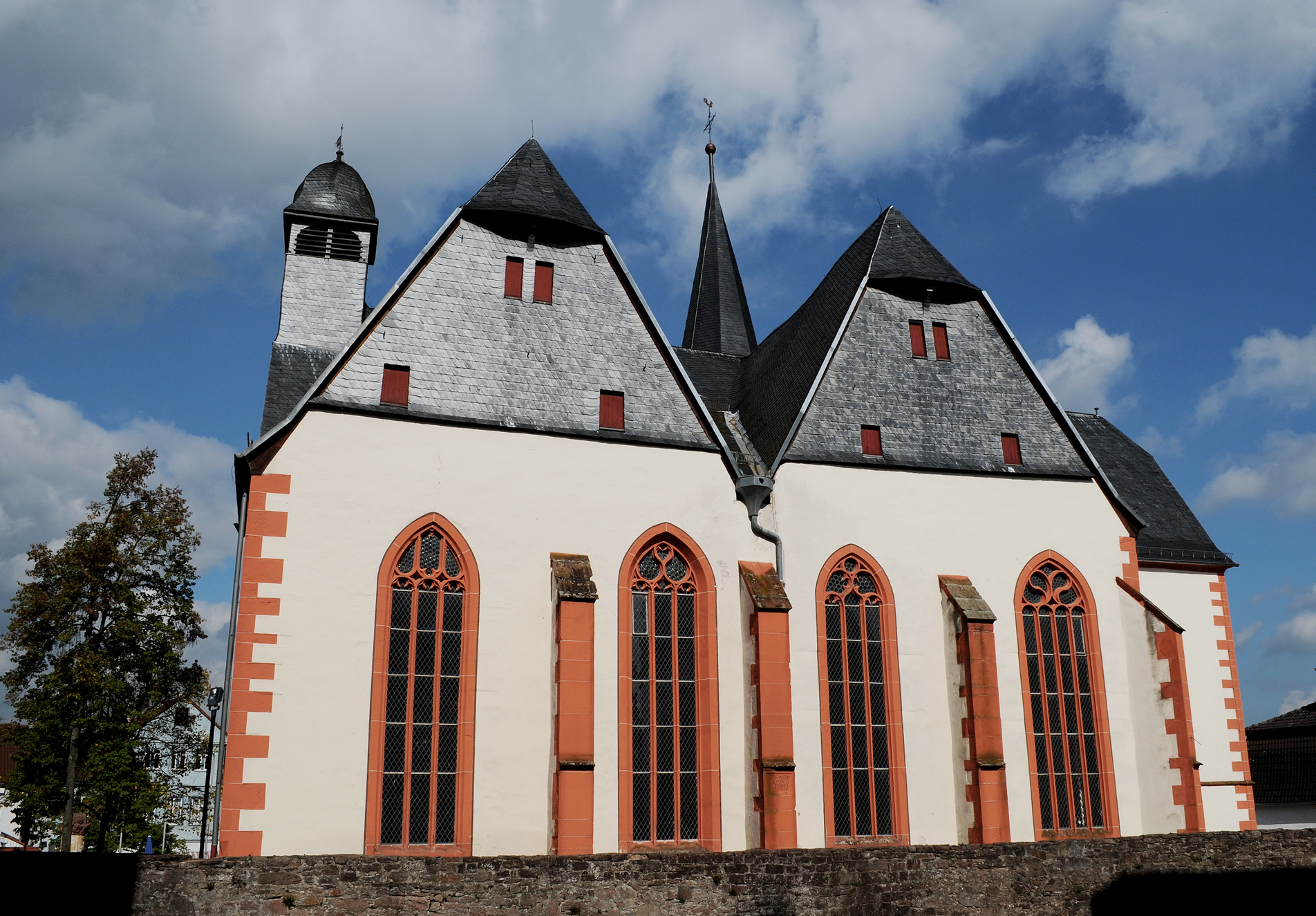 Seitenschiffe der Katharinenkirche - Steinau an der Strasse – Die Aufnahme wurde von dem Seitengang des Steinauer Schloss - 36396 Steinau gemacht.